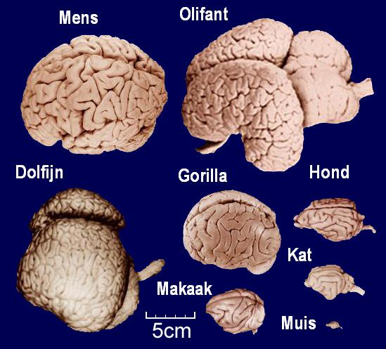 Bewerkte versie zoals die op Wikipedia voorkomt (Engelse benamingen vernederlandst)